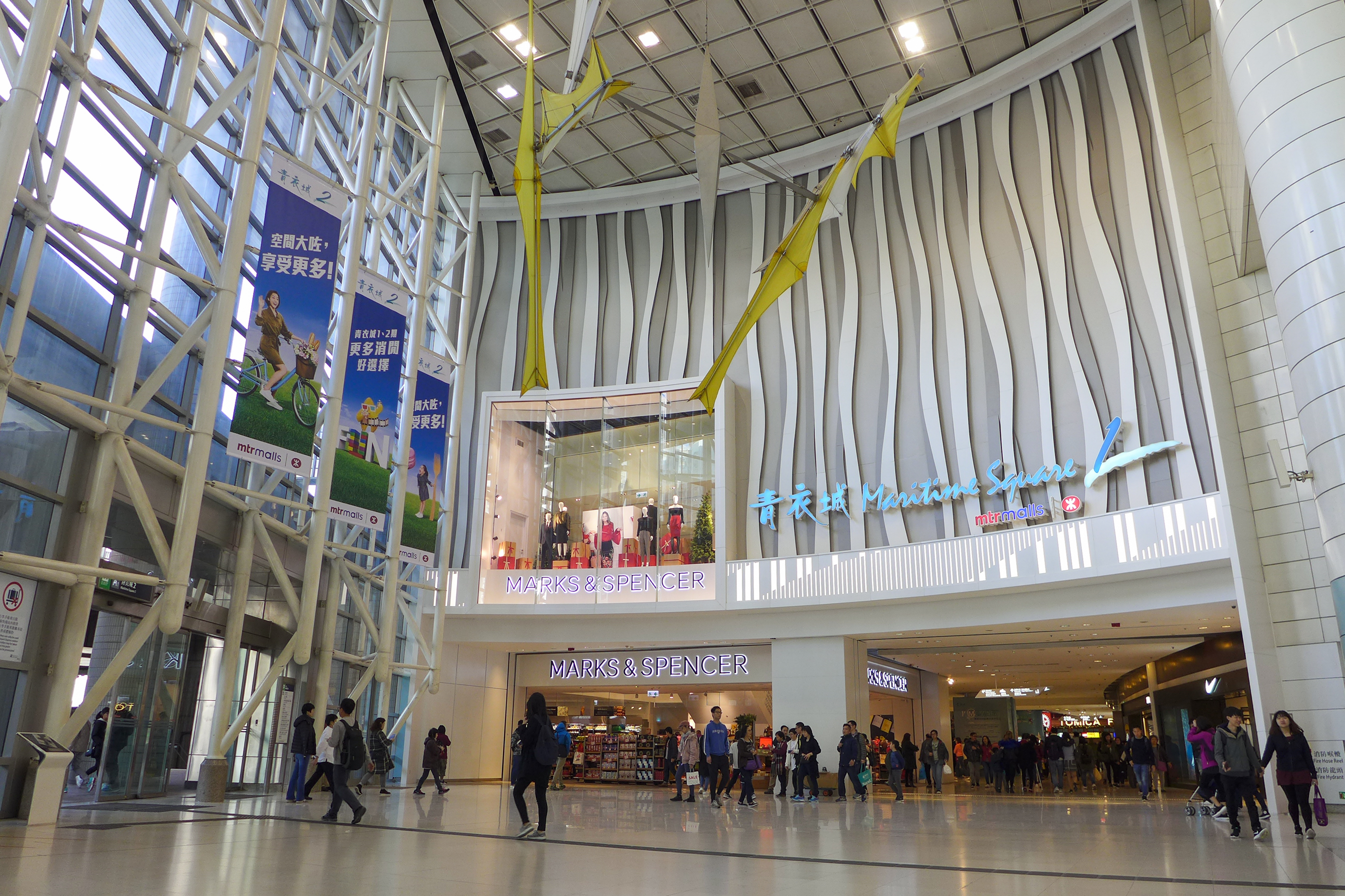 Maritime Square Enterance